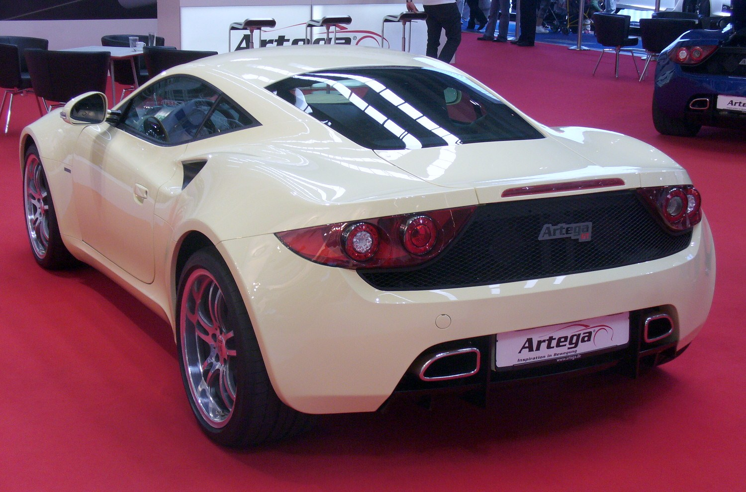 Artega GT